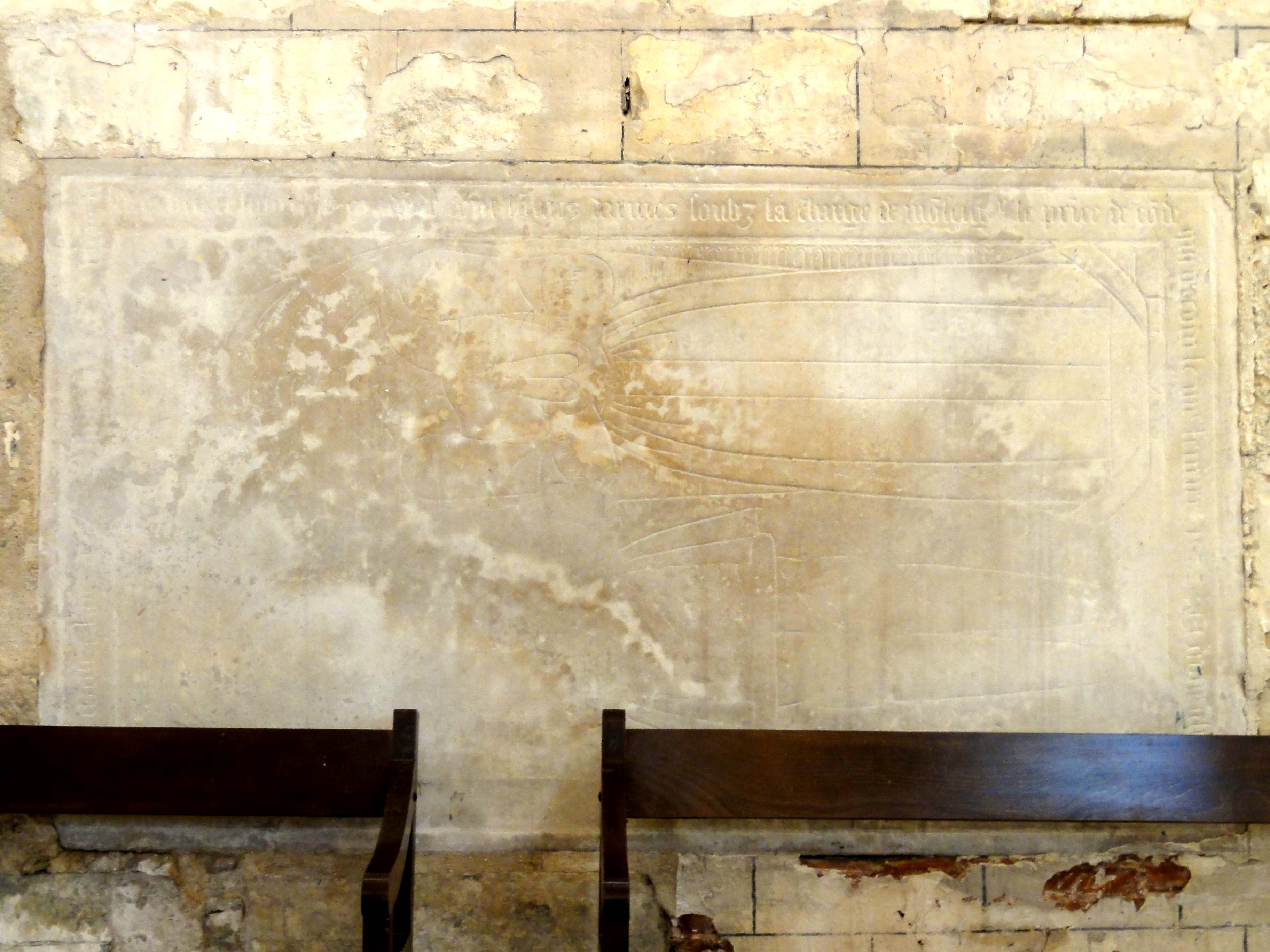 Bas-côté sud, dalle funéraire.